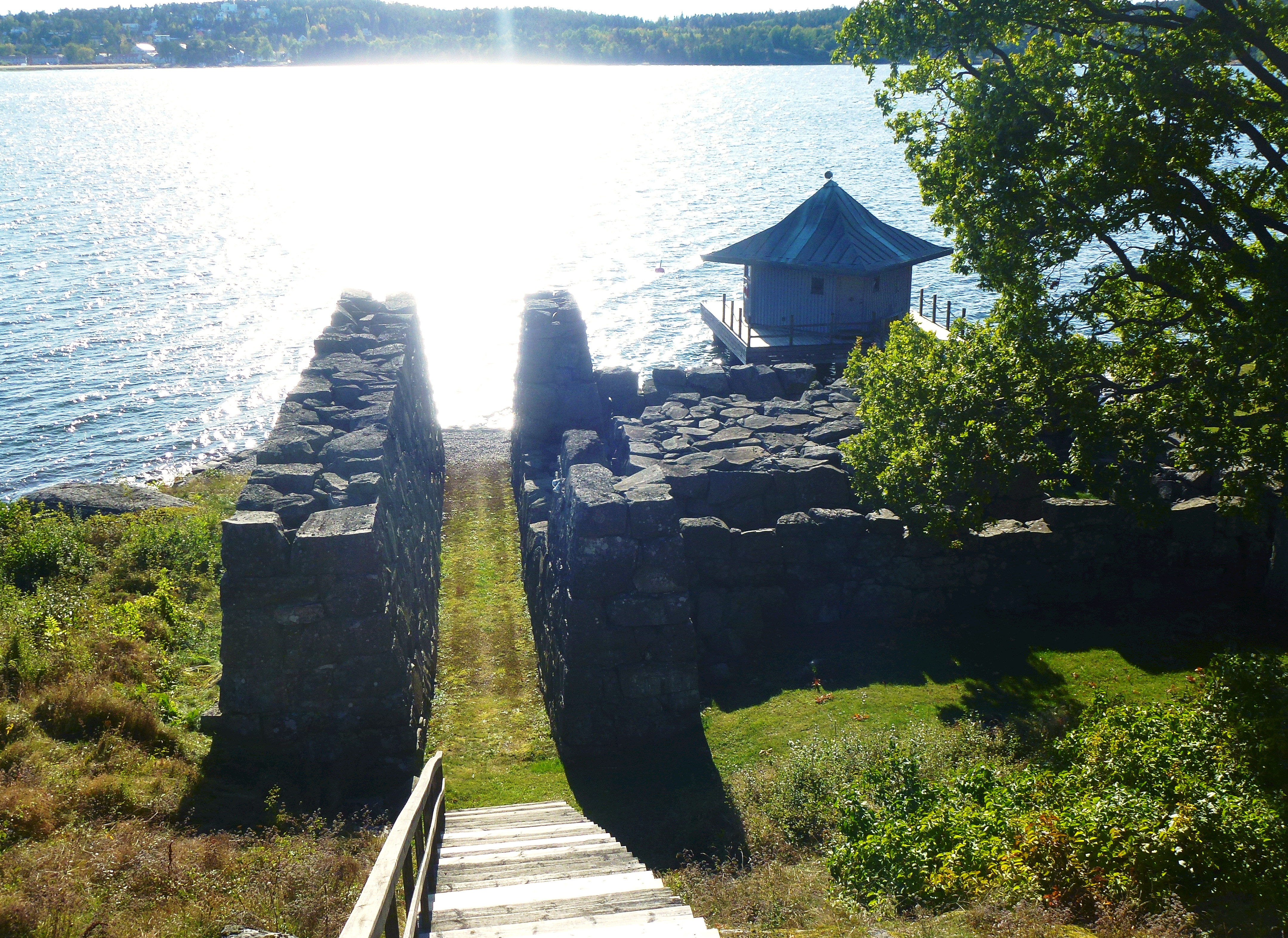 Erstaviks kvarn, grundmurar vid Erstaviken